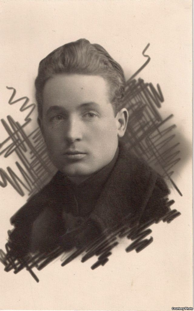 Беларуская (тарашкевіца): Кузьма Чорны. 1925 г. З фондаў БДАМЛМ.